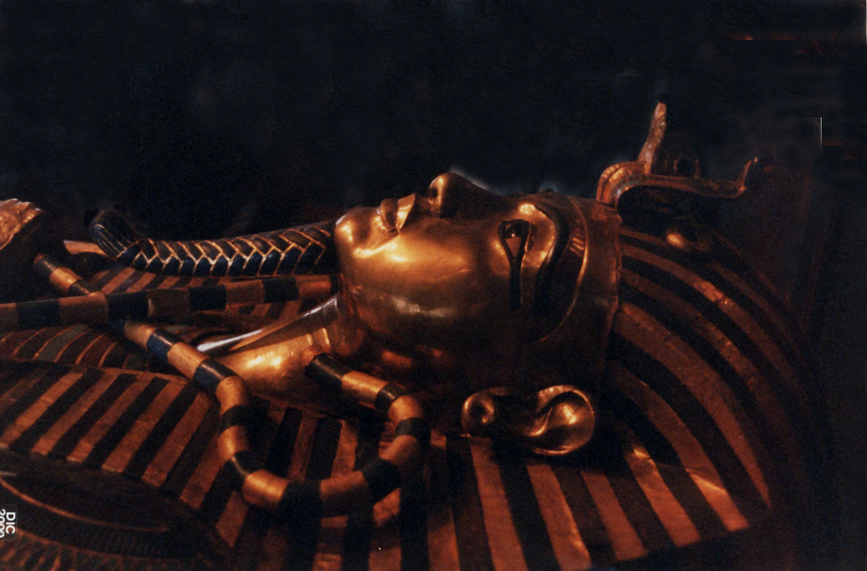 Autore: Hotepibre (Giuseppe); Località e data: il Cairo, Museo Egizio, dicembre 2000; Soggetto: il secondo sarcofago in legno ricoperto d'oro di Tutankhamon (dalla tomba KV62 della Valle dei Re)